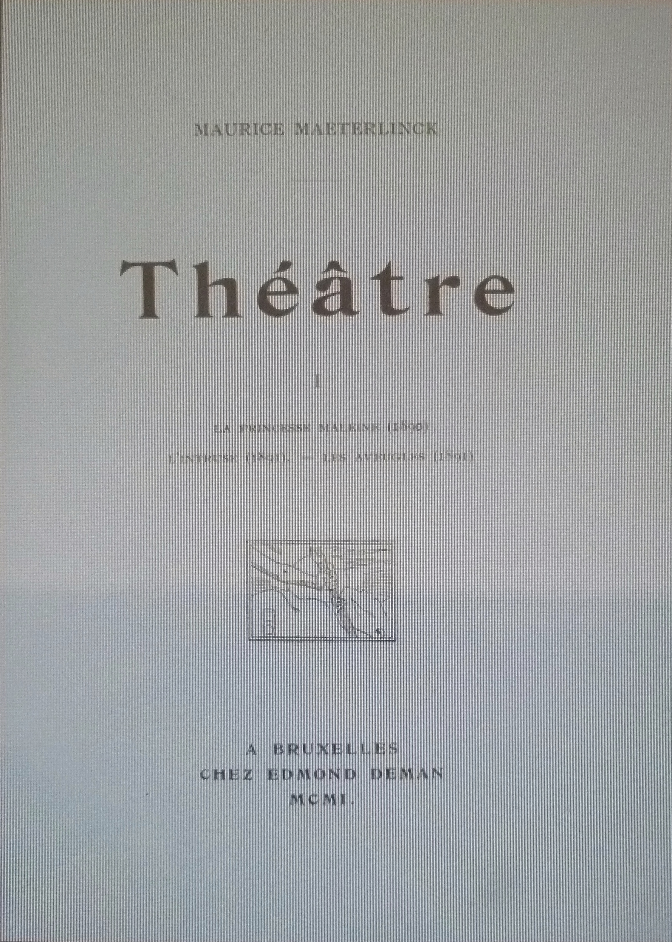 Maeterlinck - Théâtre I- La Princesse Maleine (1889) - L'Intruse (1890) - l'Aveugle (1890); privébezit